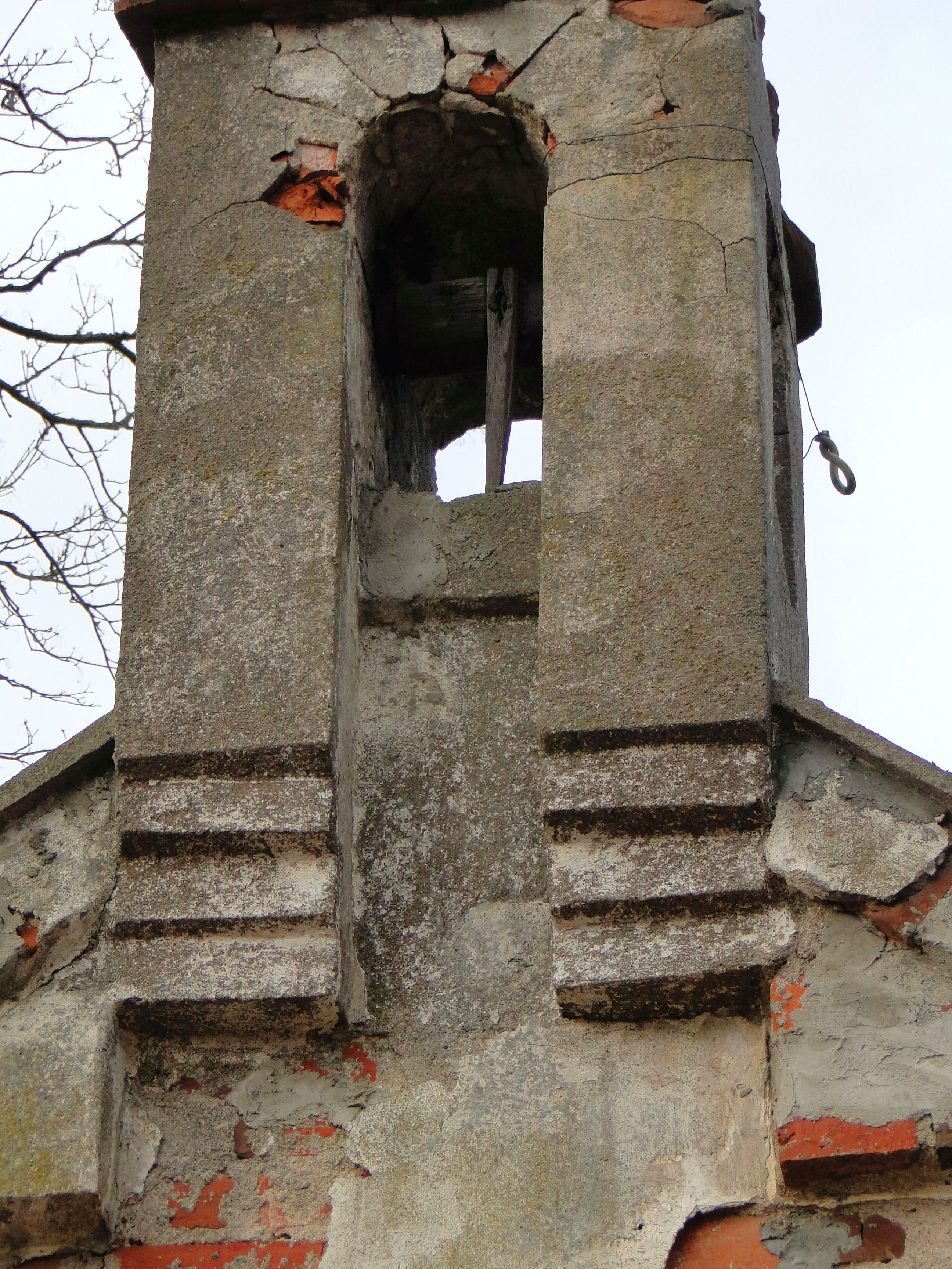 Tu wisiał dzwon gospodarski do zwoływania ludzi.